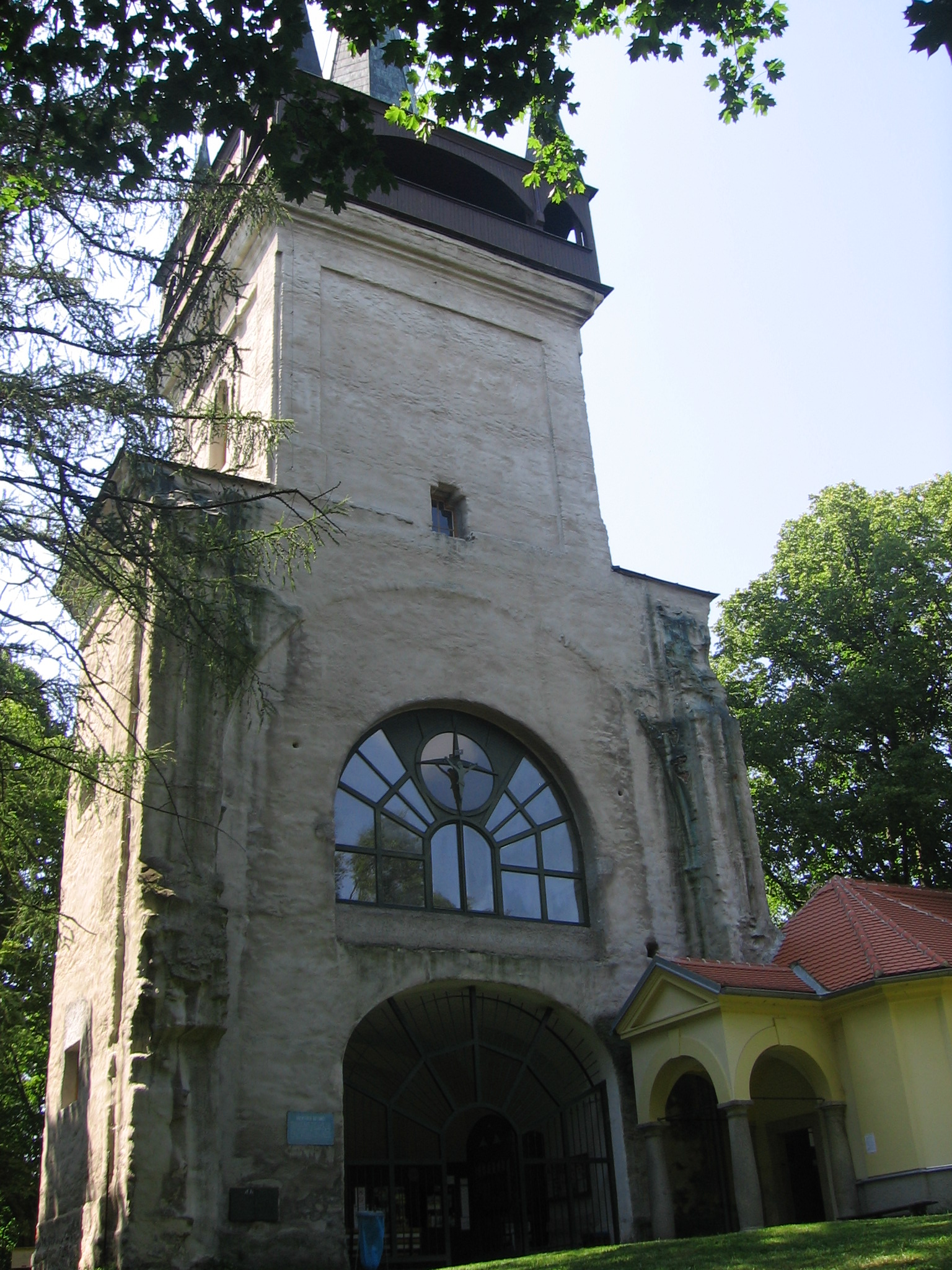 Věž býv. kostela sv. Wolfganga - Bolfánek, na kopci nad zámkem Lázeň, Chudenice, okr.Klatovy